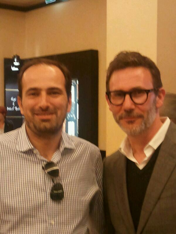 Michel Hazanavicius y el crítico de cine Diego Moldes. Cannes. 19-5-2013